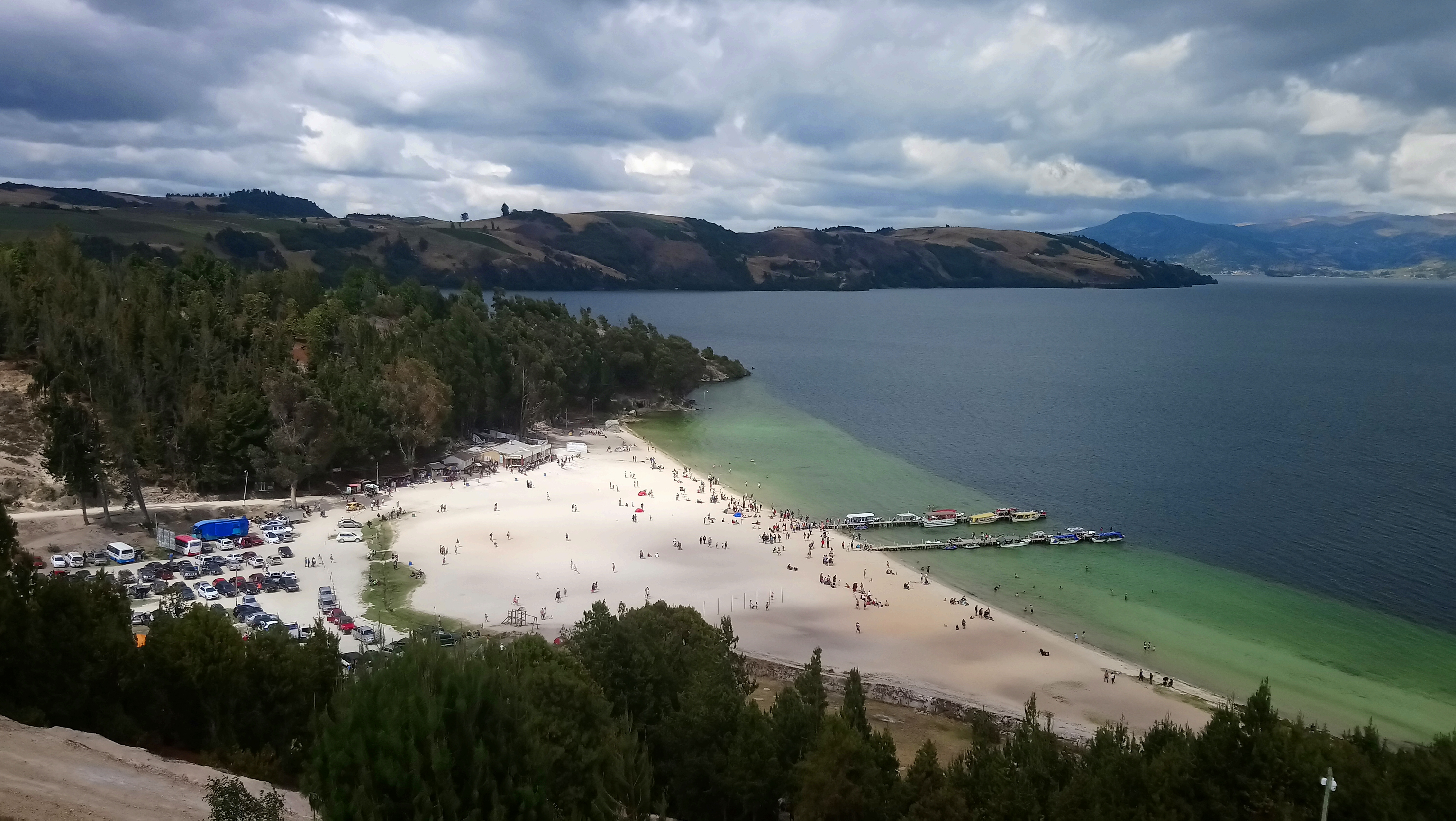 Playa Blanca, Lago de Tota, departamento de Boyacá, Colombia